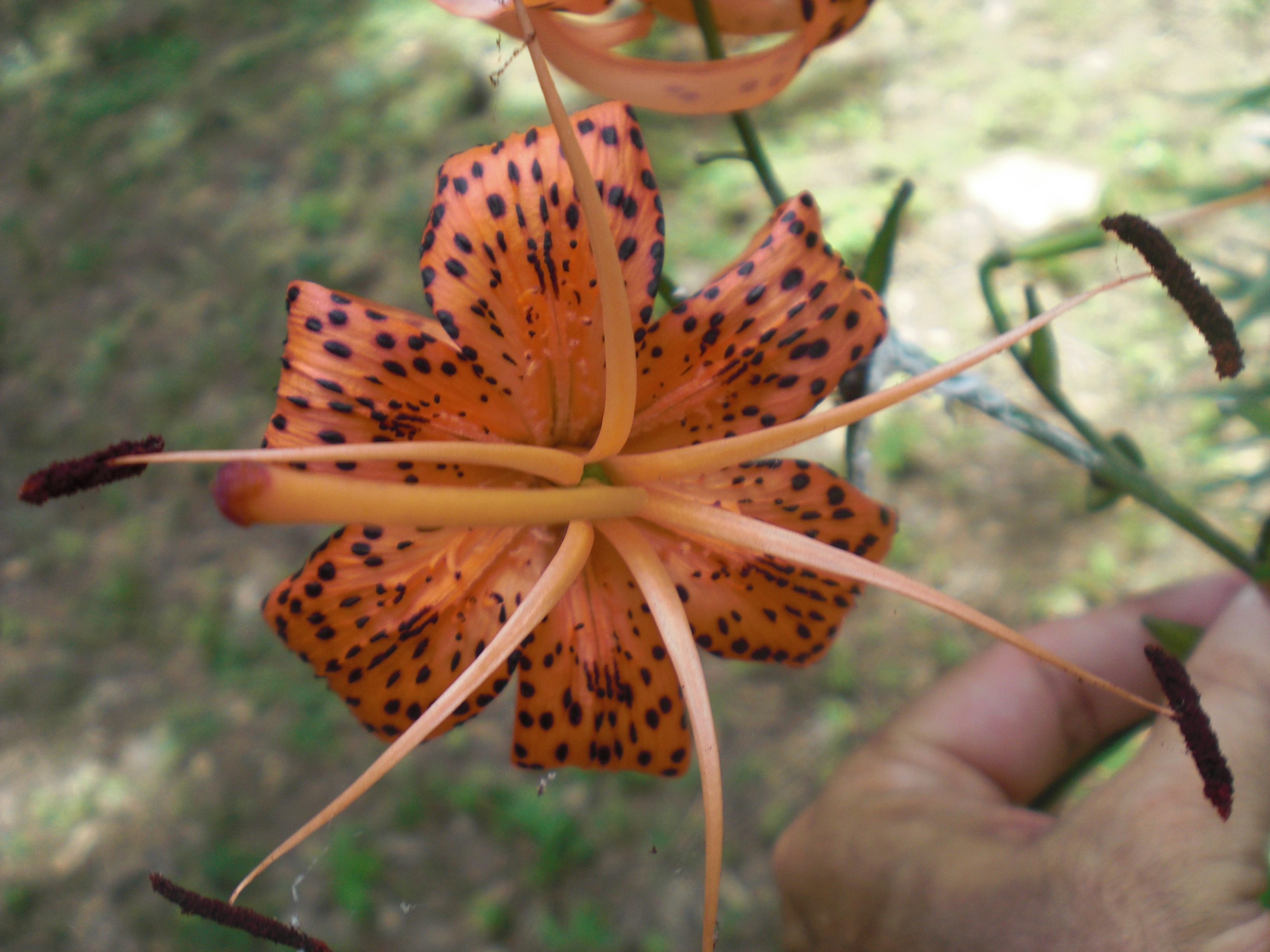 Lilium lancifolium en kamparo ĉe Gimpo, Suda Koreio, apud SAT kongreso de 2017.